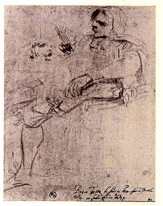 Studio per un ritratto di Pietro Testa